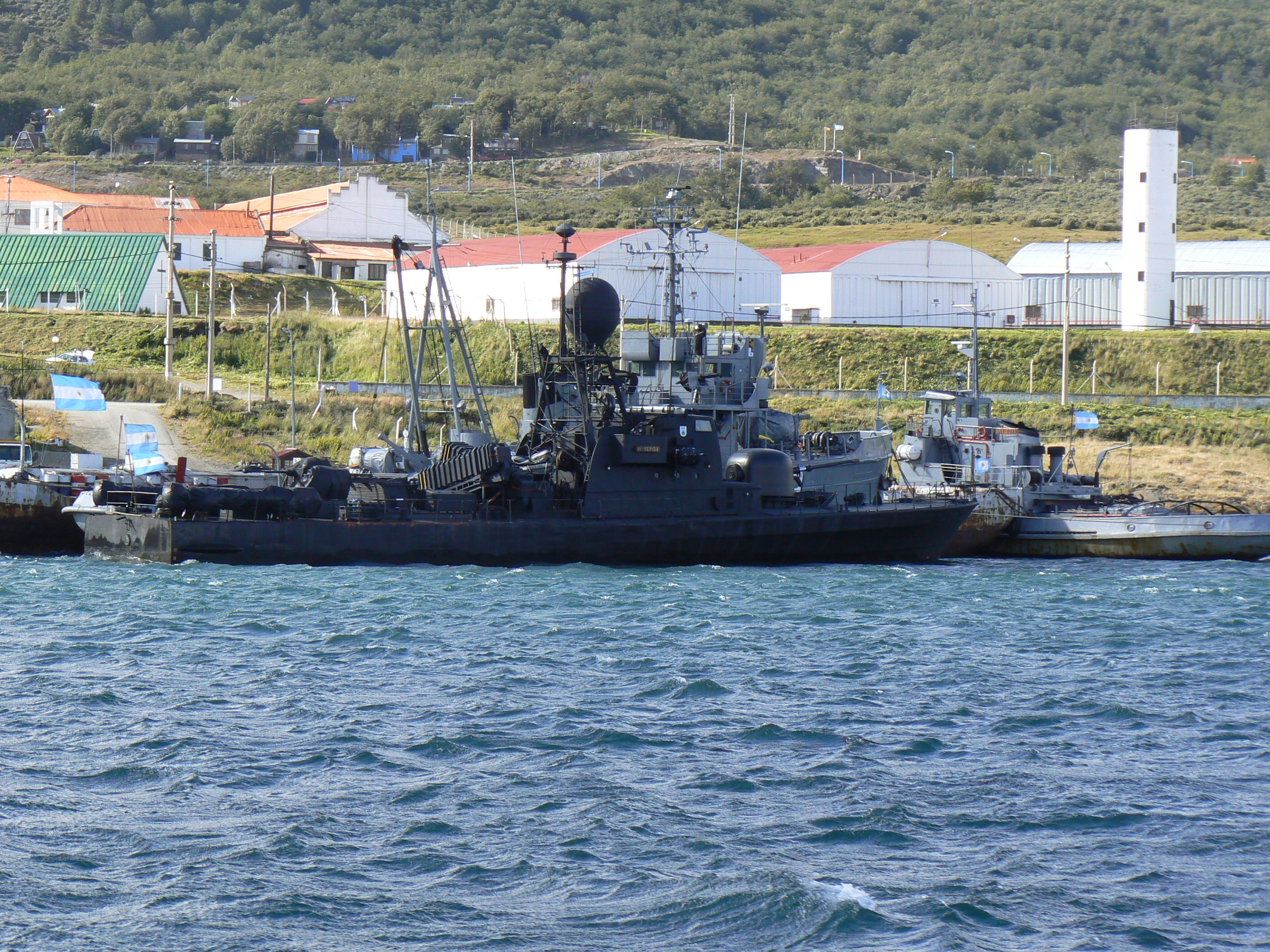 El patrullero Intrepida en su apostadero de Ushuaia